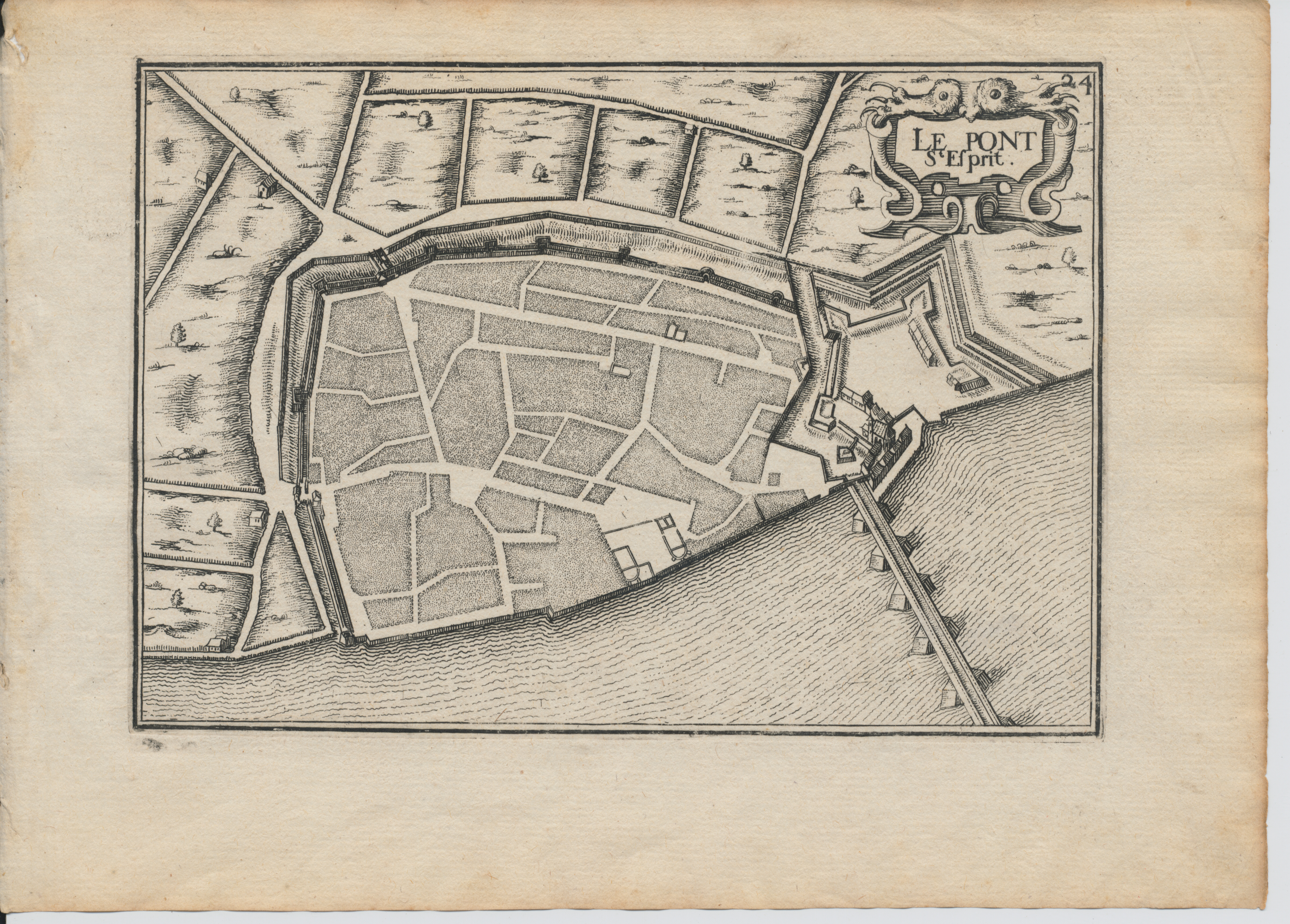 Extrait de "Les Plans et Profils de toutes les principales villes et lieux considérables de France. par le Sieur TASSIN, géographe ordinaire de sa Majesté. A paris, Chez Melchior Tavernier, en l'Isle du Palais. 1634" (Province de Languedoc)